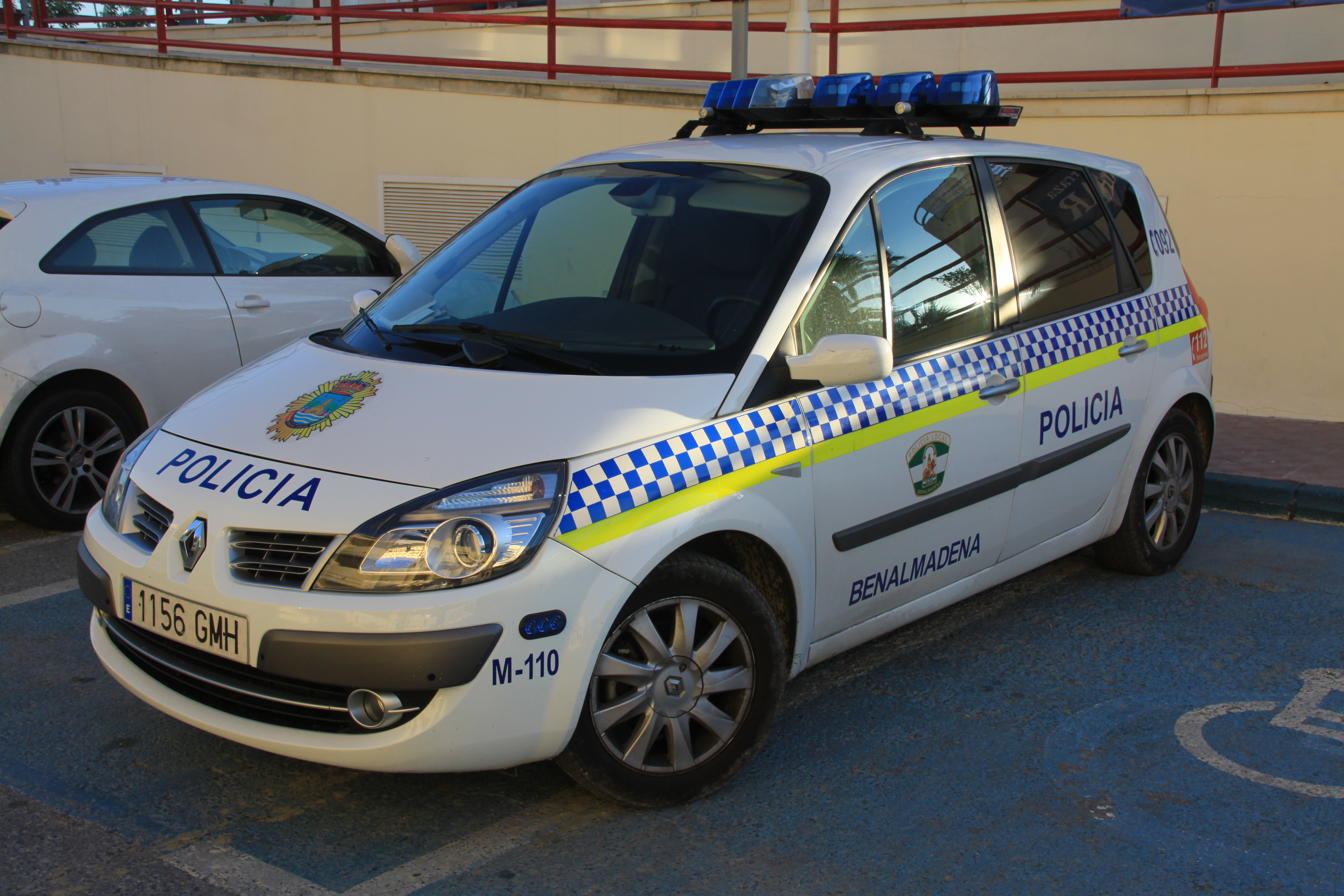 Benalmádena local police car